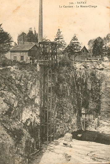 Carte postale de la carrière de grès Le Chevallier à Bavay, exploitée jusque dans les années 60. Elle a été comblée dans les années 70 avec des marnes provenant d'une carrière proche à Bellignies. Ce site est maintenant la Réserve naturelle régionale de la carrière des Nerviens.